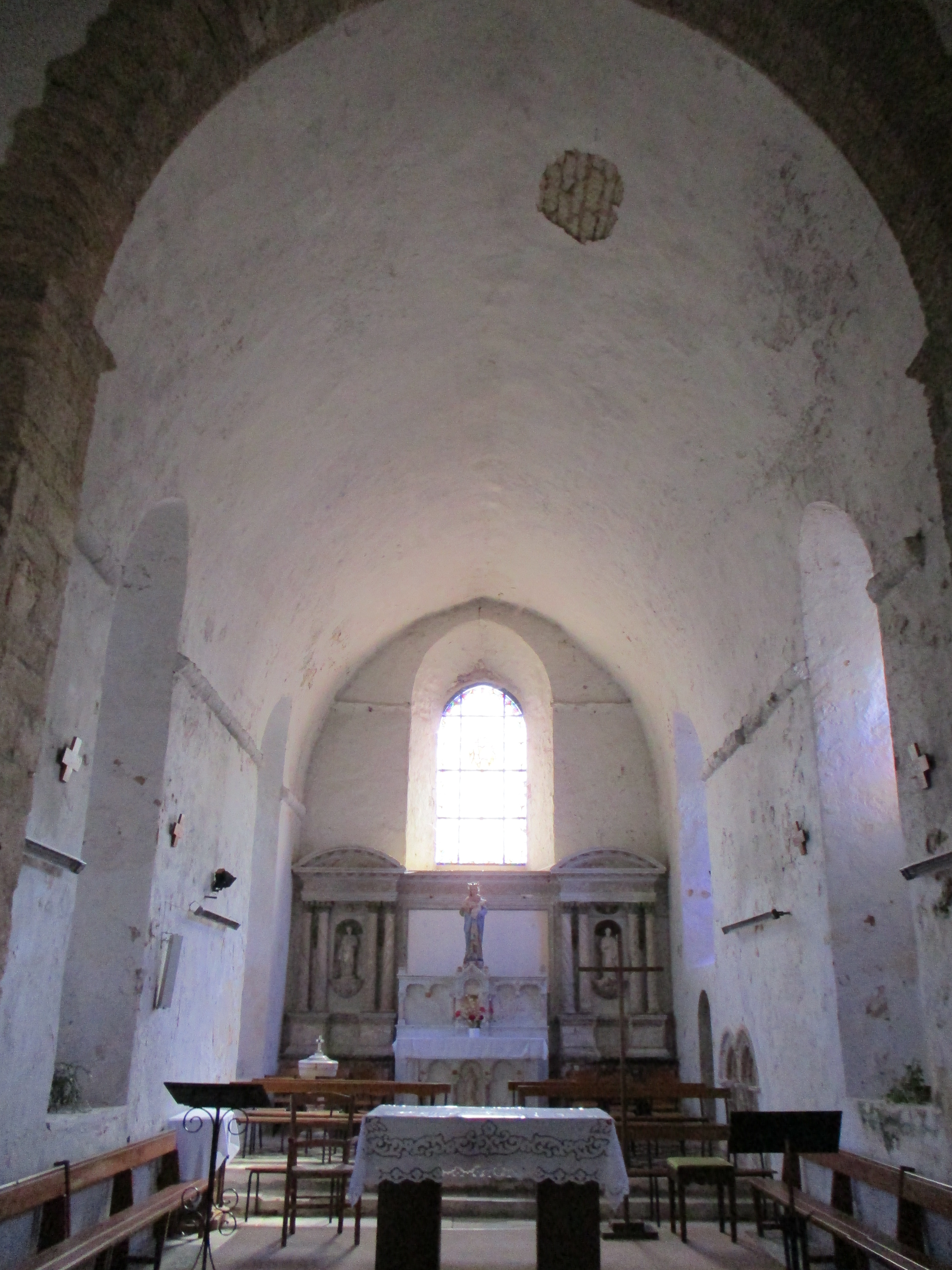 Photographie de l'intérieur de l'église Saint Vincent de St Vincent sur Jard en Vendée montrant le chœur élevé au début du XIIe siècle.